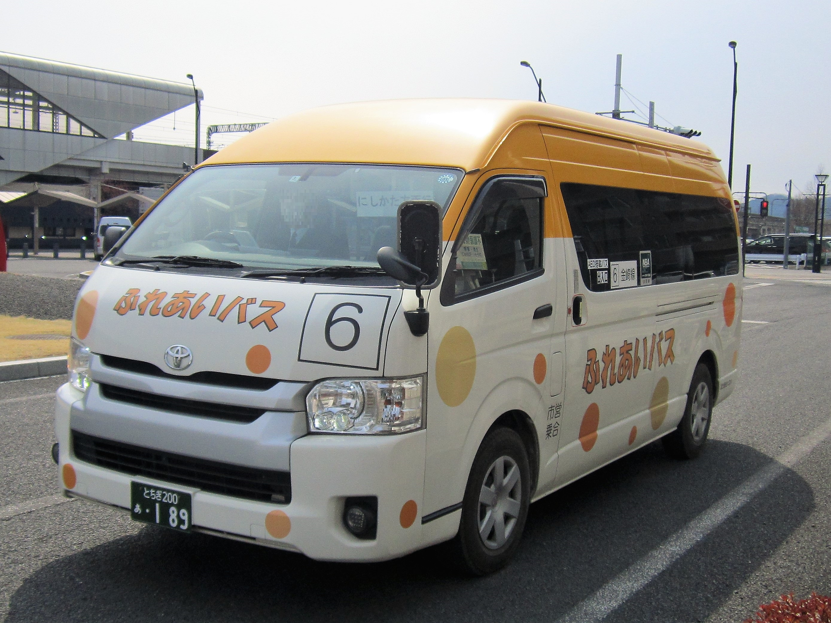 栃木市営バス（ふれあいバス）金崎線 Canon PowerShot A2200